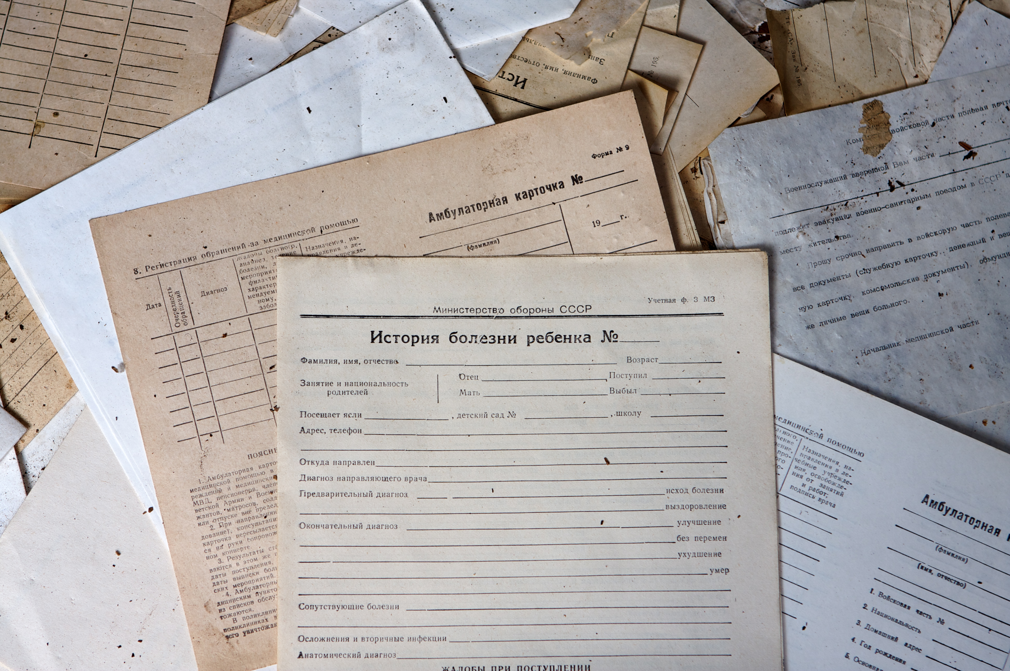 seen at Beelitz-Heilstätten, near Berlin